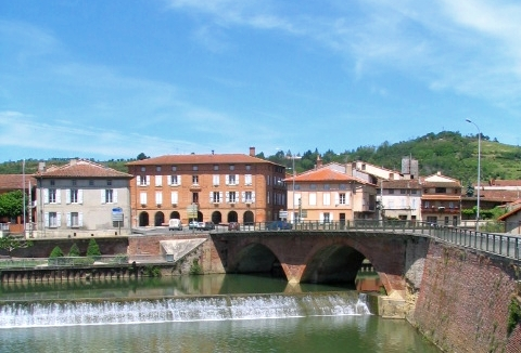 Le pont et la mairie de Montesquieu-Volvestre